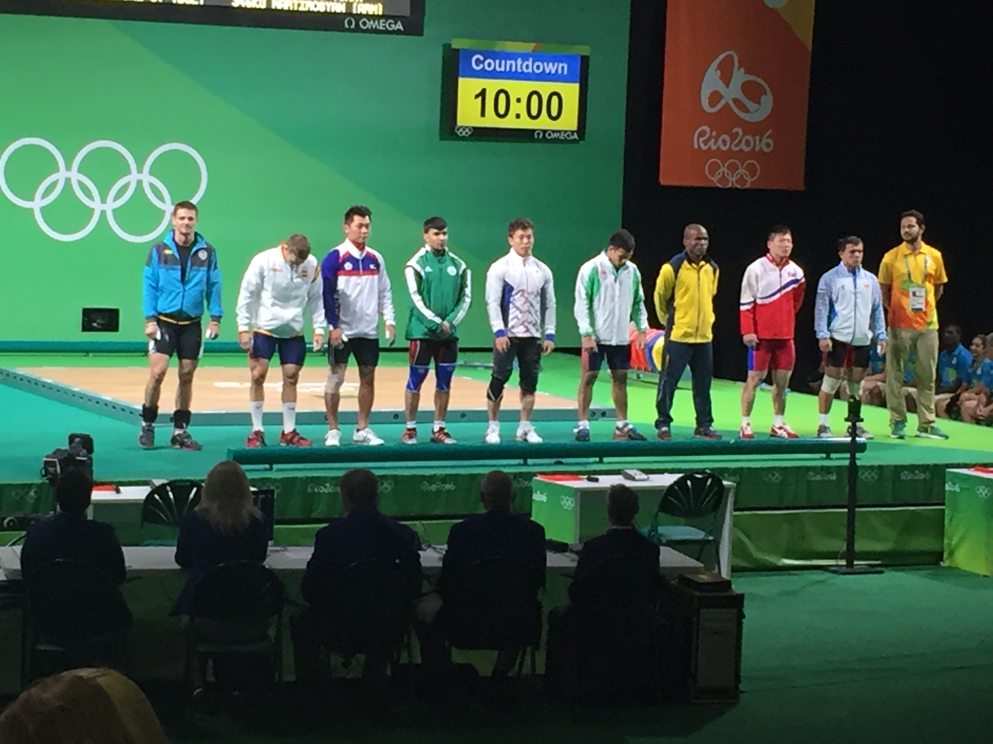 Rio 2016 - Weightlifting Men 69kg prelim.